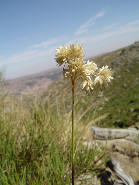 Luzula lactea, La Serrota, Ávila, España